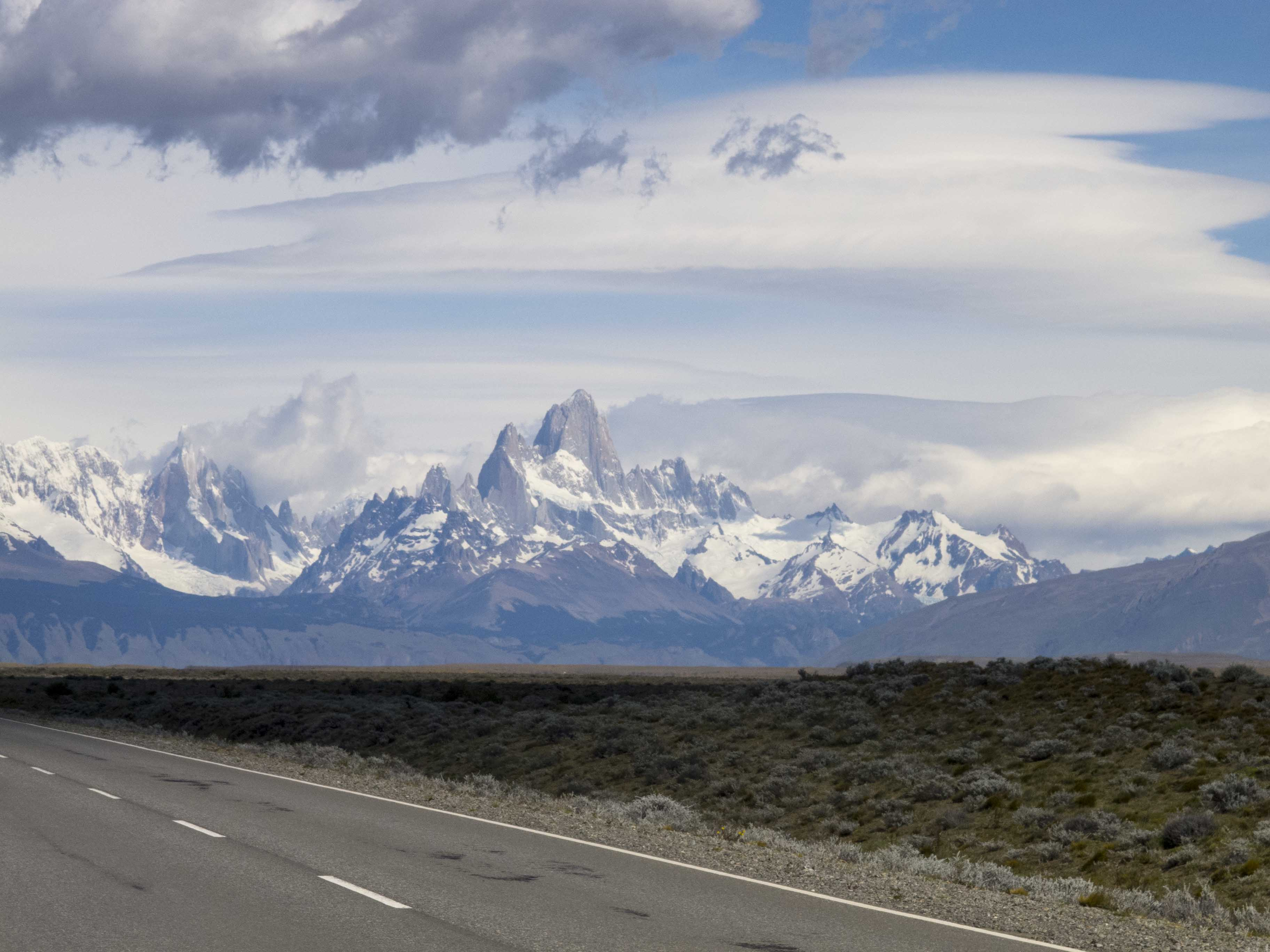 Las Bellezas naturales convocan al turismo